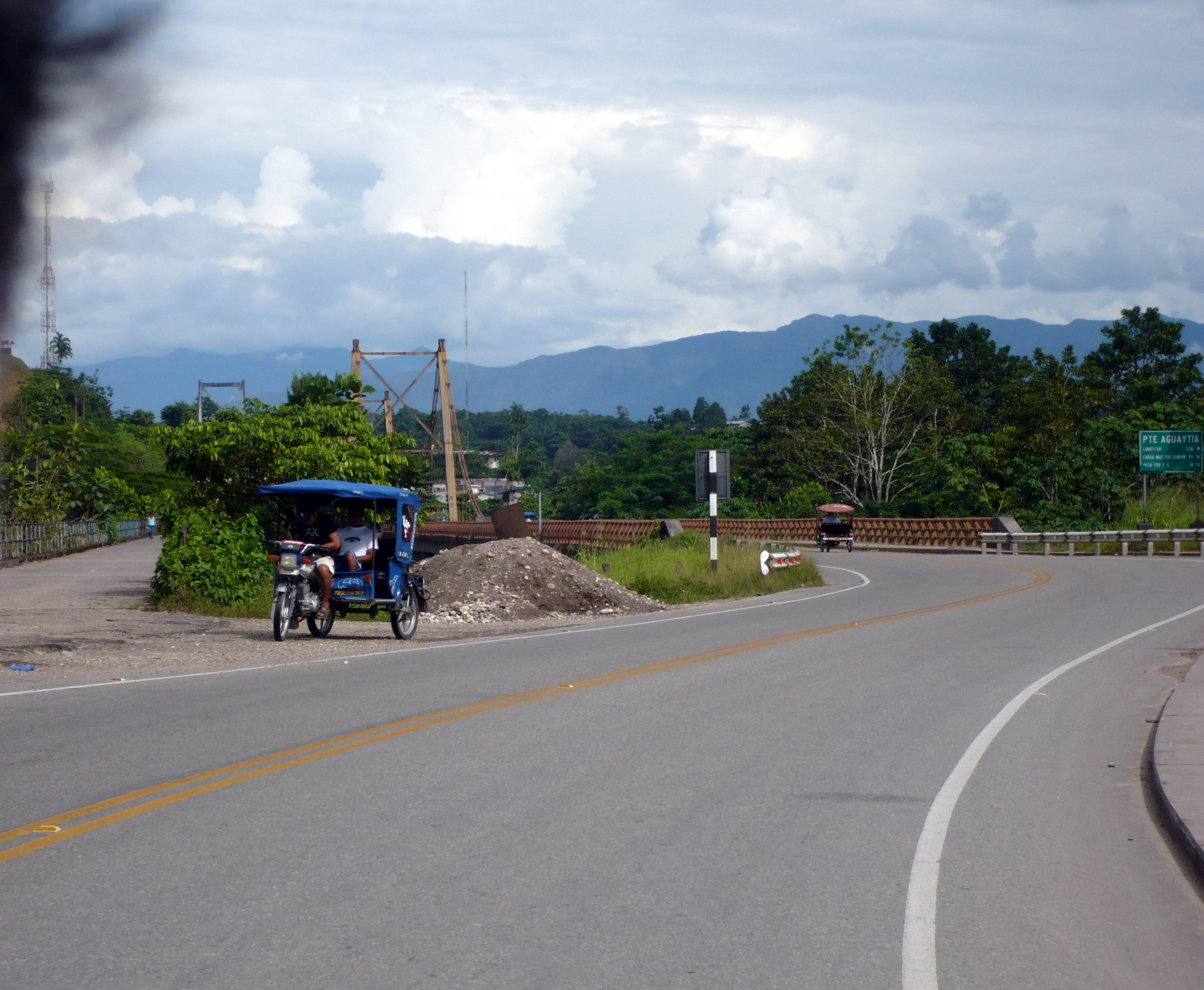 El puente de Aguaytía visto desde el inicio.